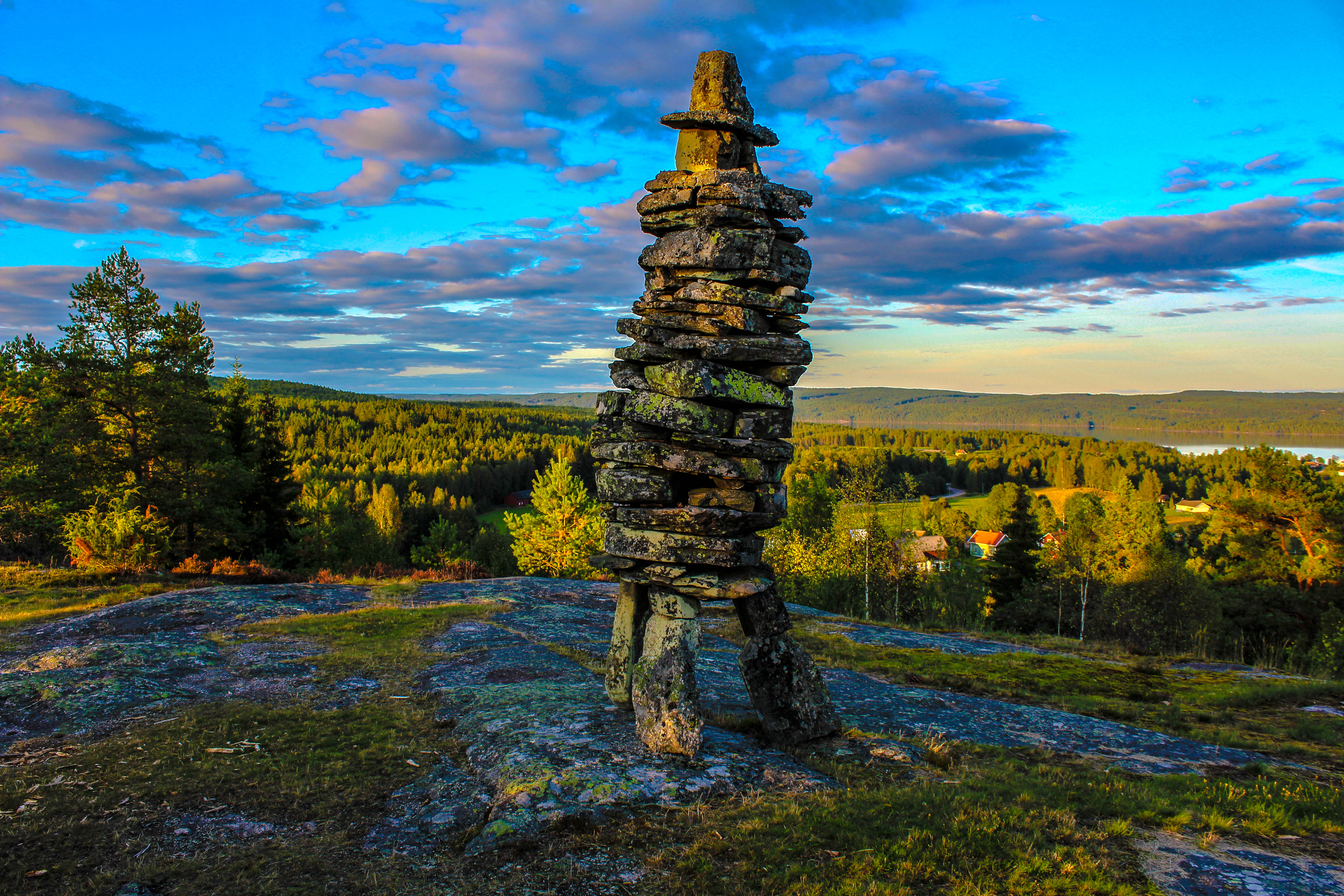 Borgåsgubben i Blomskog - September 2015